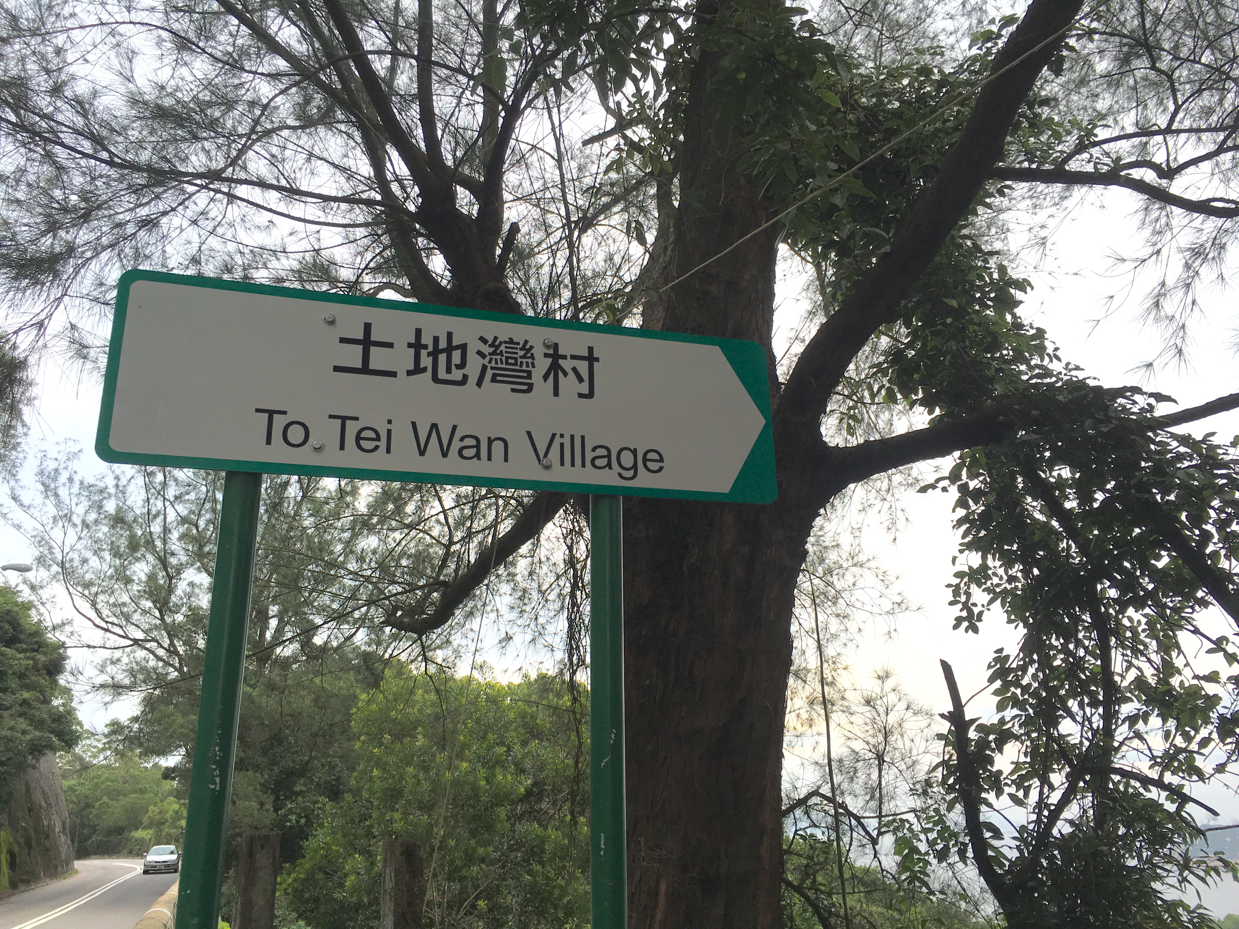 土地灣村路牌。